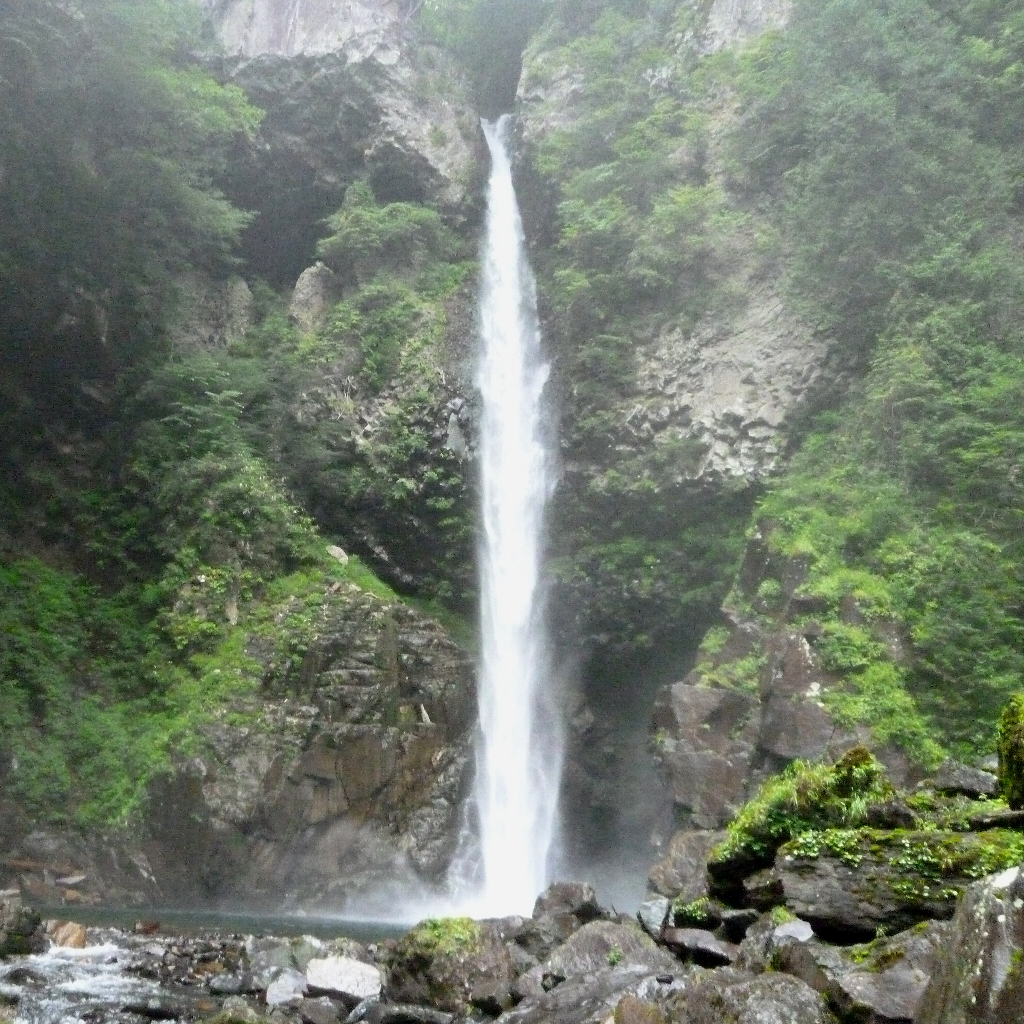 滝壺付近より見た根尾の滝。